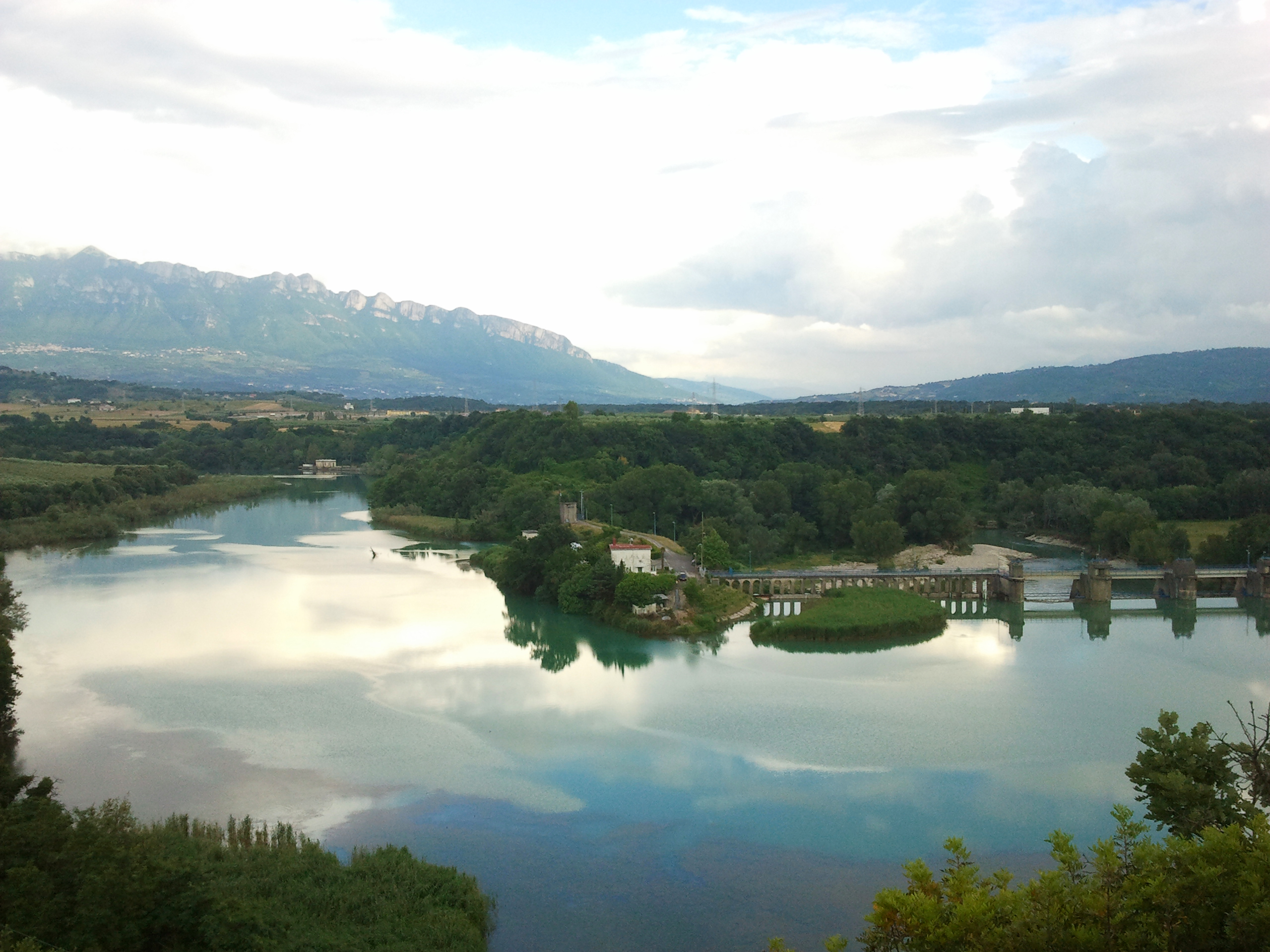 Oasi WWF di Persano - Diga This is a photo of a monument which is part of cultural heritage of Italy. The authorisation for taking photos of this object was provided by the World Wide Fund for Nature Italy.